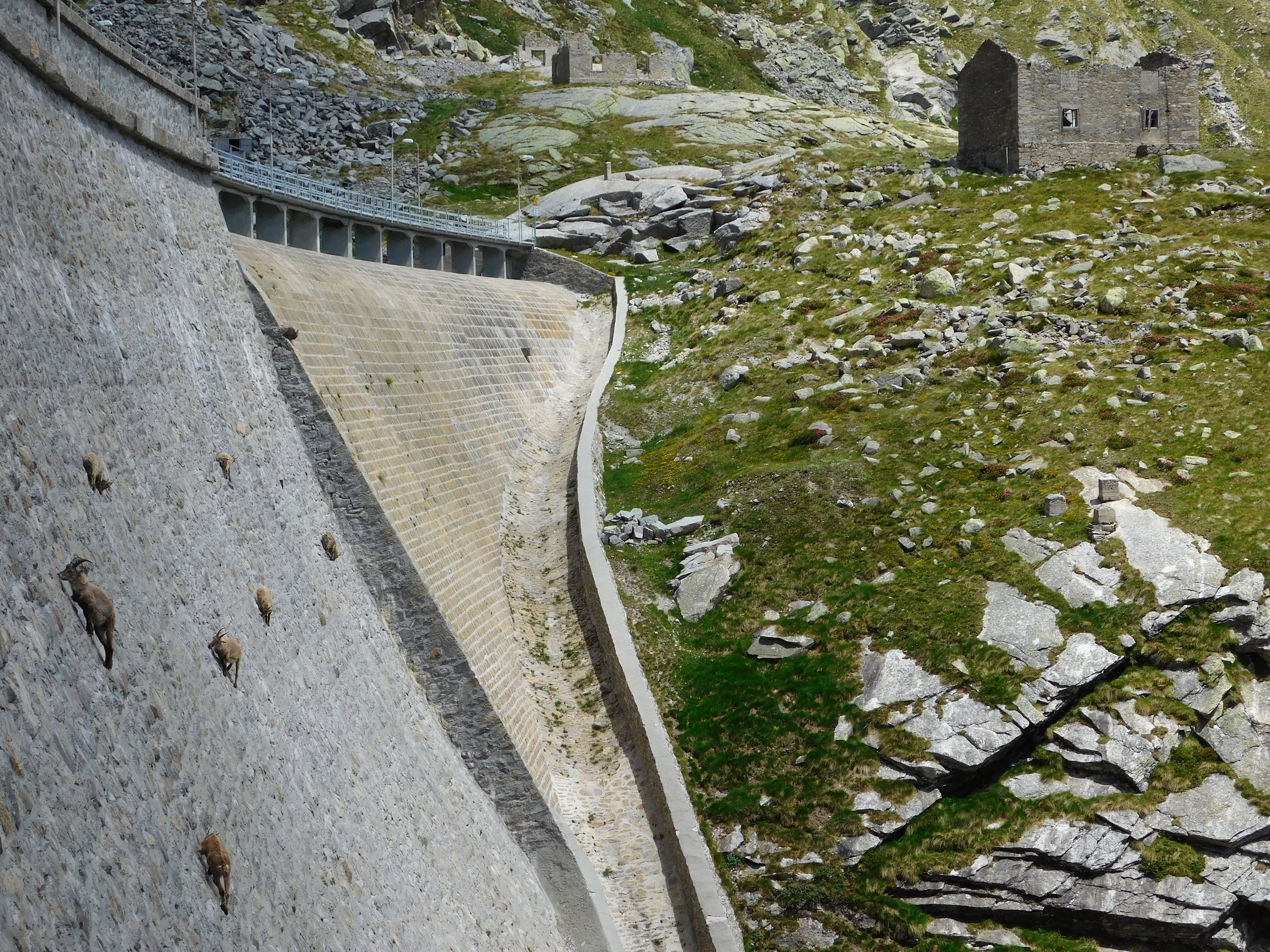 Parco naturale dell'Alta Valle Antrona (Q3895641)